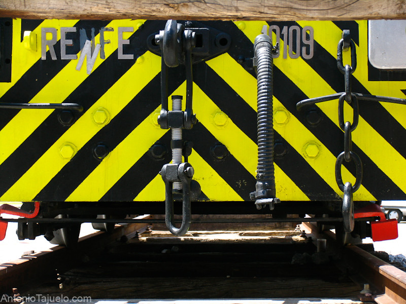 Gancho de husillo de la locomotora diésel-hidráulica de la serie 301 de RENFE preservada en un pedestal sobre la estación Alonso de Mendoza del Metro de Madrid en Getafe. Puedes ver la entrada completa en